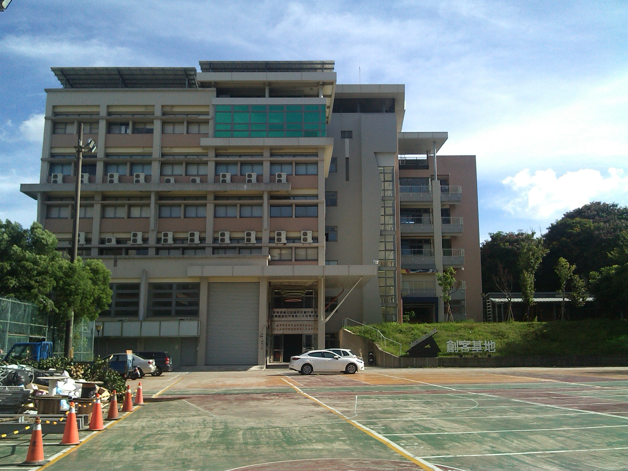 位於校區西南隅 生科大樓旁